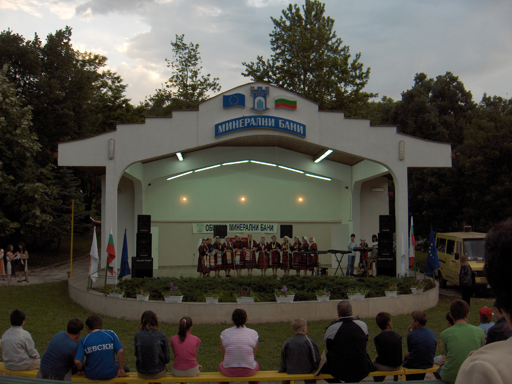 минерални бани България - Meriçler, Bulgaristan